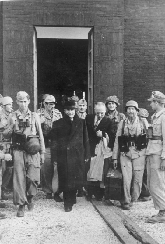 AVZ Der Duce, geleitet von seinen Befreiern, verlässt sein Gefängnis. Achtung! PK-Aufnahme! Bei Abdruck nennen: PK-Aufnahme, Kriegsberichter von Kayser (Sch) 17.9.43, J15420